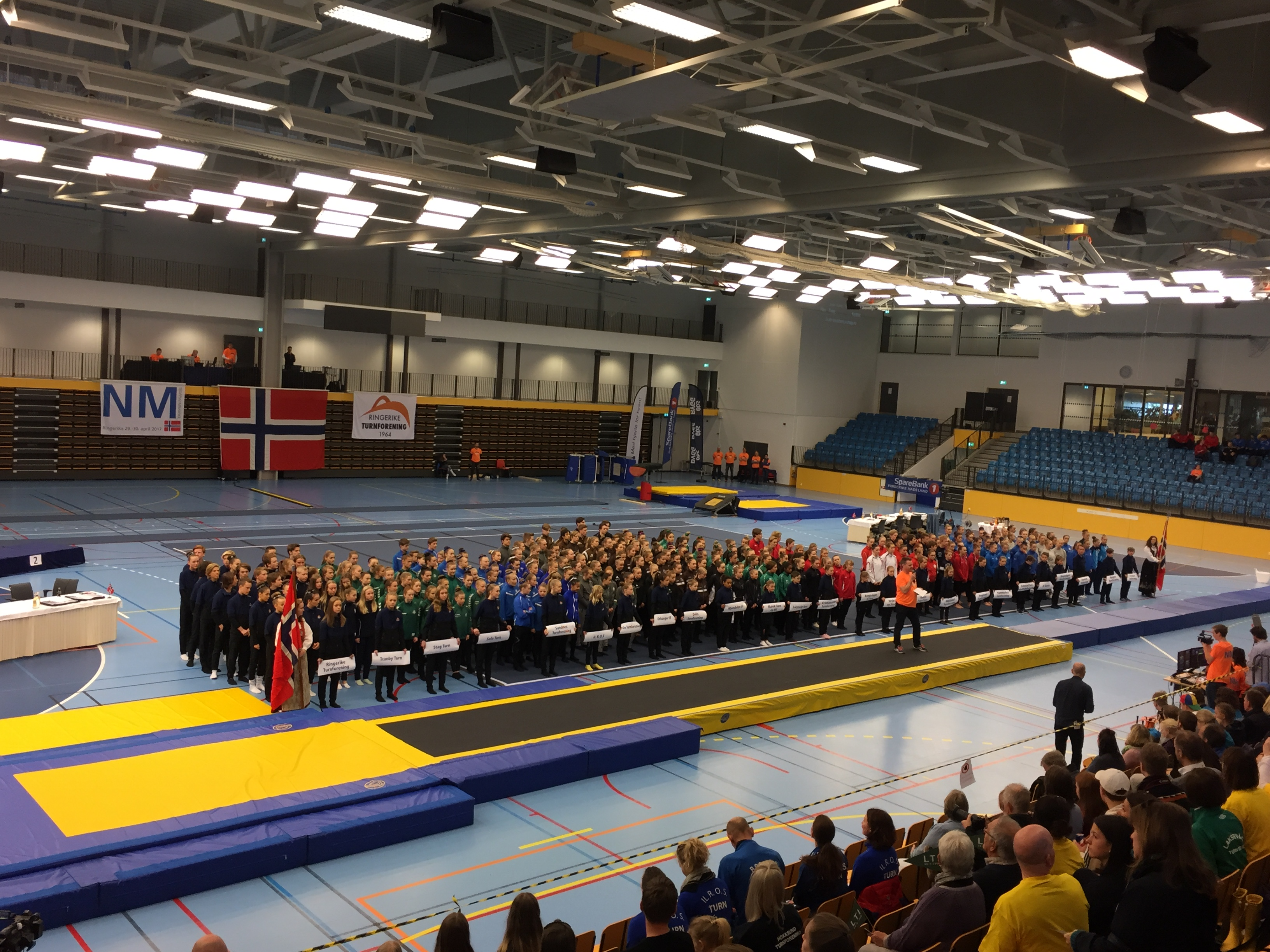 Junior-NM troppsturn 2017 Ringerike - Defilering